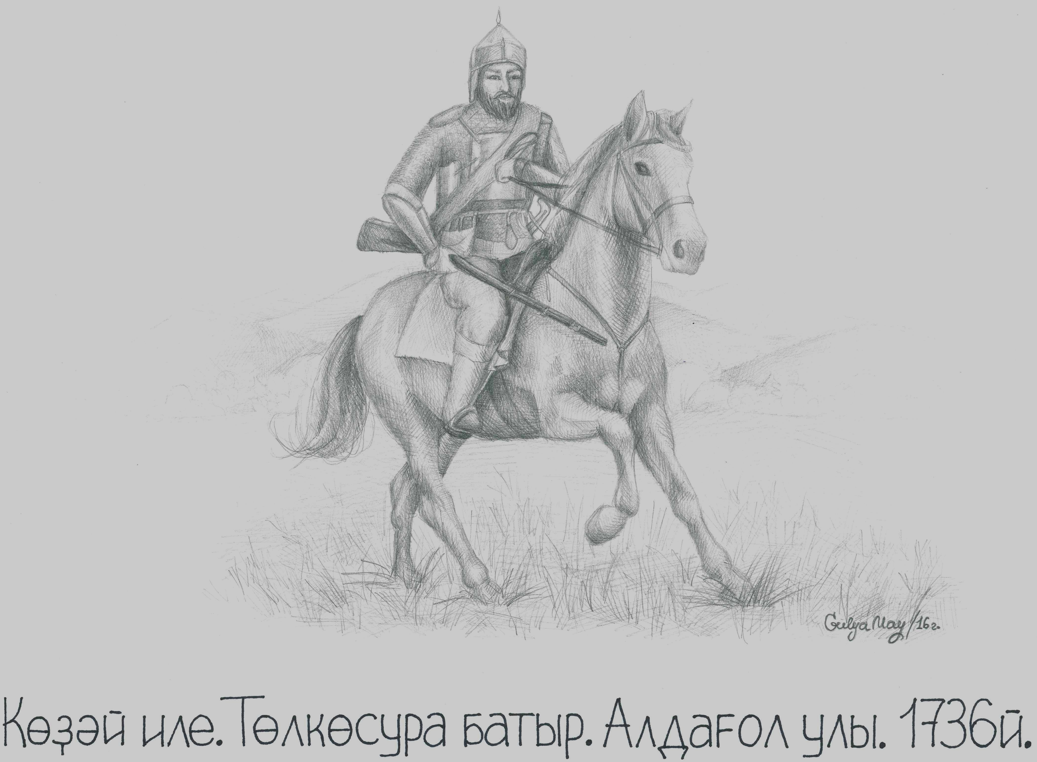 Рисунок 2016 года. Автор идеи, подбор исторического материала - Сагидулин Р. Художник - Юлгильдина Г.